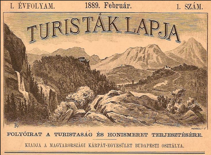 Turisticko-vlastivedný časopis Turisták Lapja (Časopis turistov 1889 – 1919. Vydával Magyarországi Kárpátegyesület Budapesti Osztálya